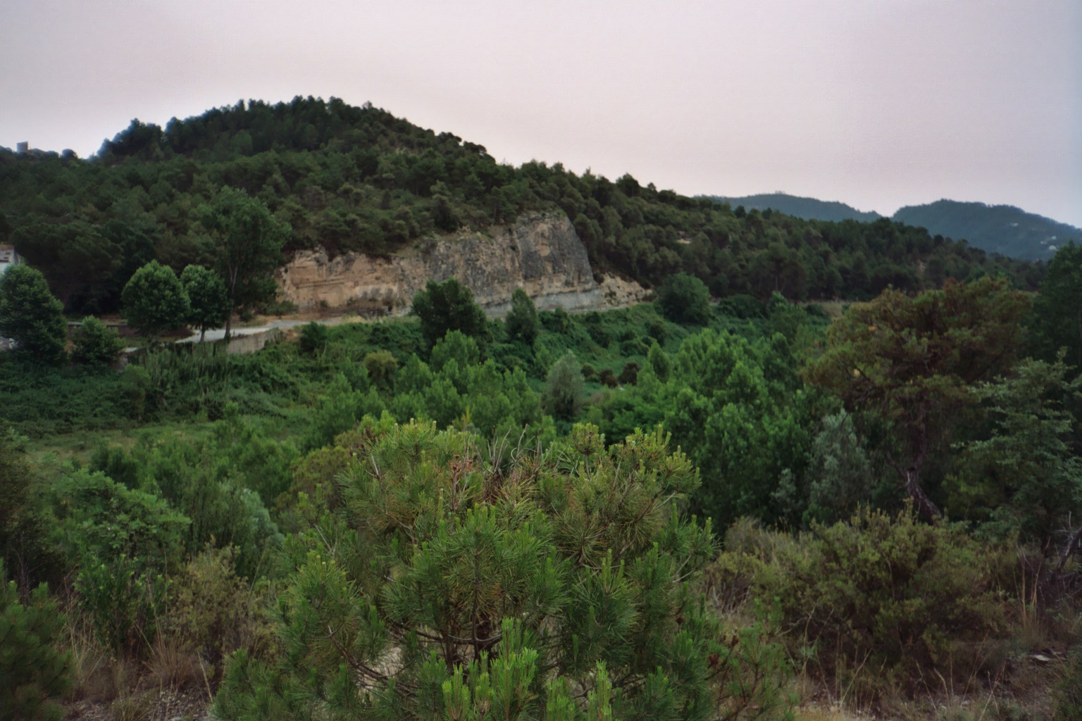 El Serrat dels Ametllers (Monistrol de Calders, Moianès)